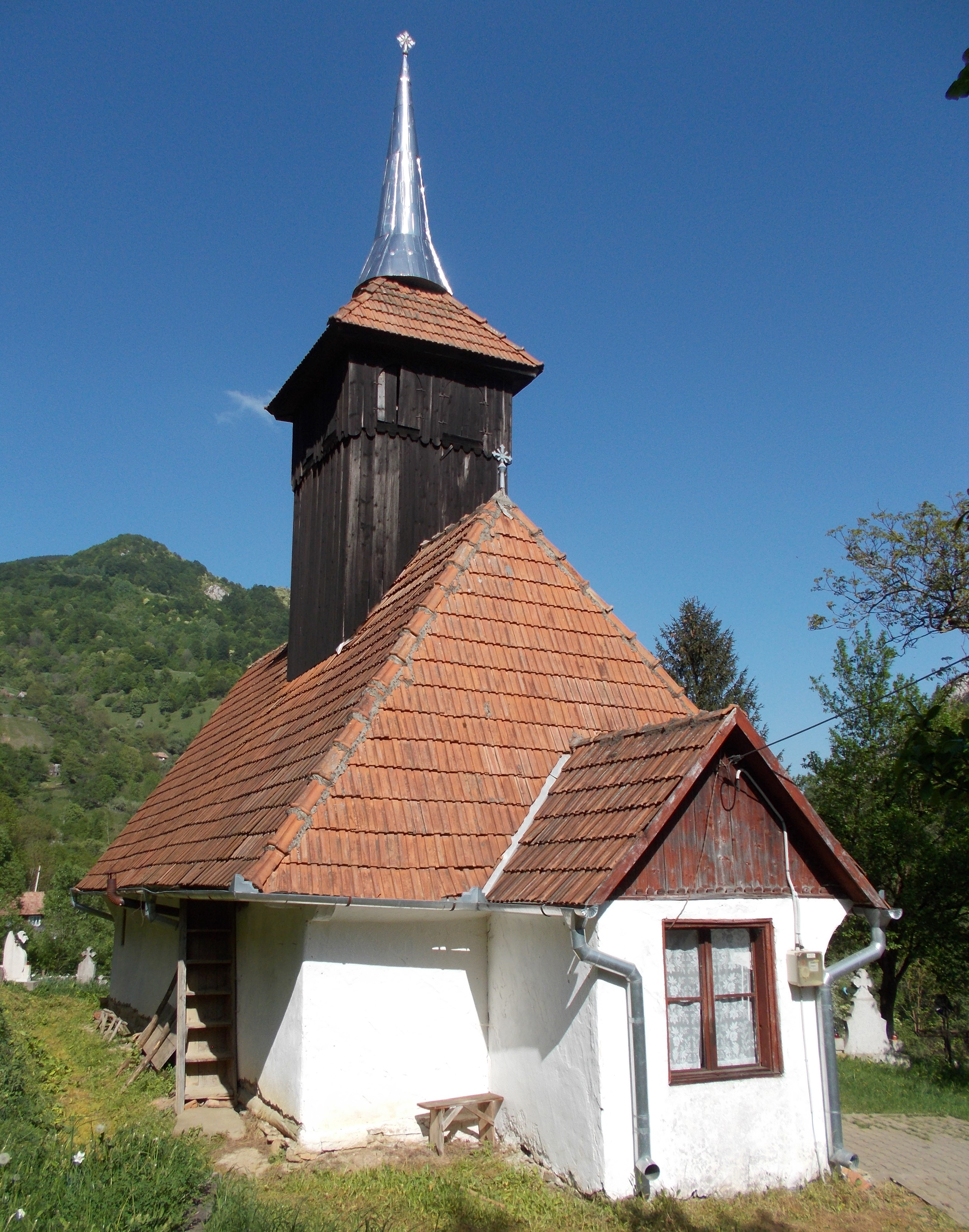 Biserica de lemn din Modolești (Întregalde), județul Alba